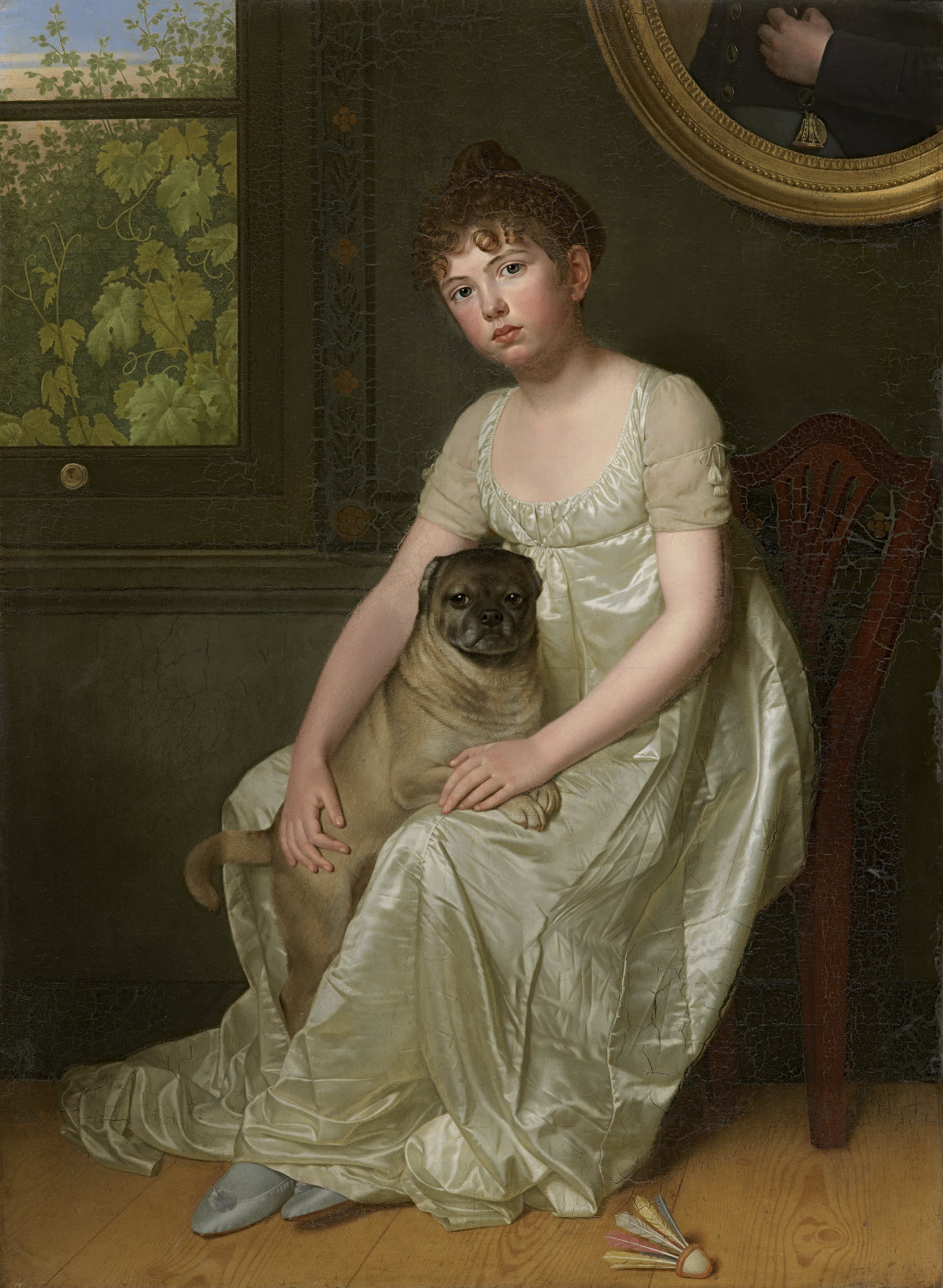 Waarschijnlijk stelt het portret de nichtje van Franciscus van der Donckt, Sylvie de la Rue voor, die later zal huwen met de kunstschilder Joseph Denis Odevaere.